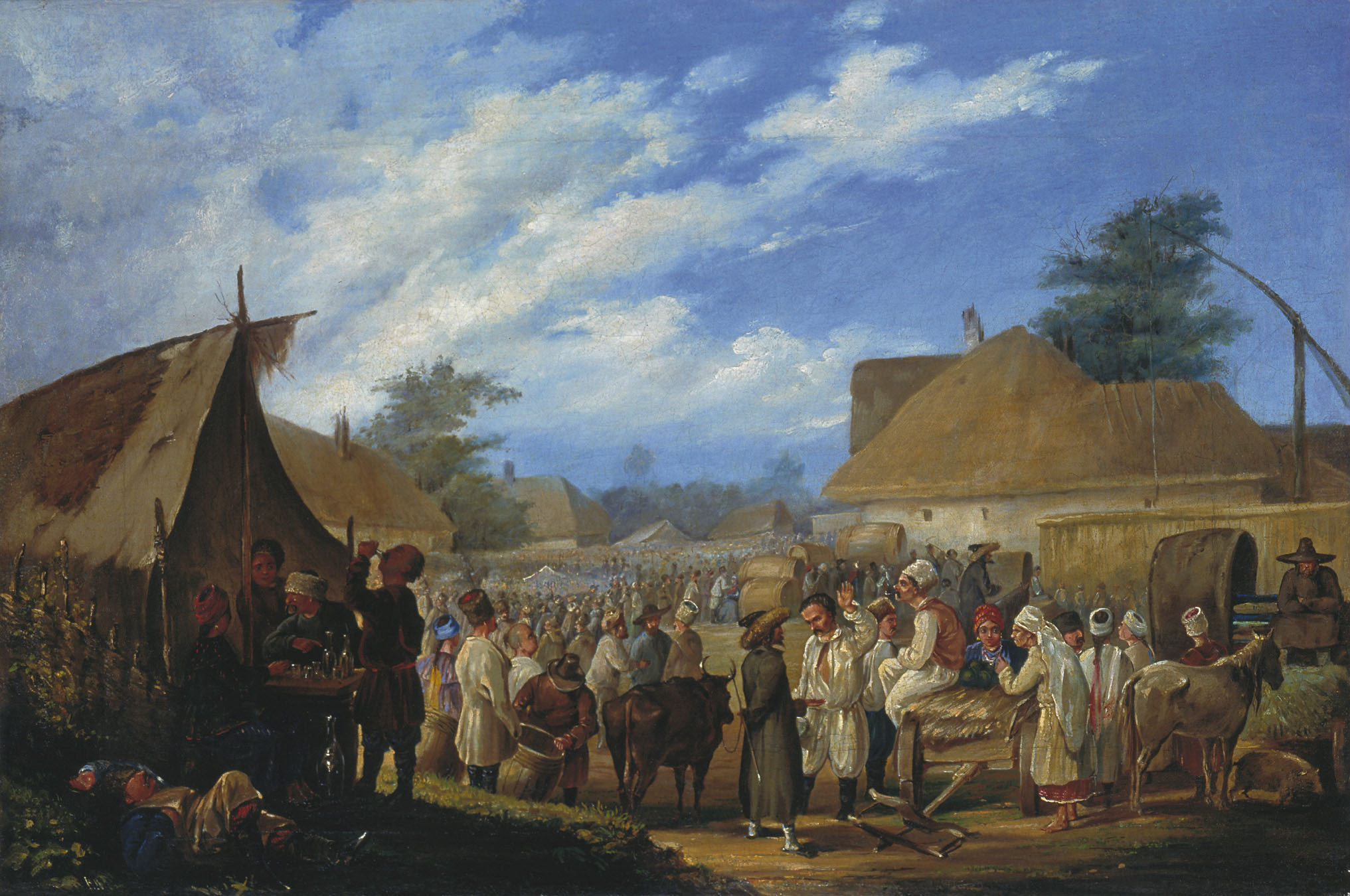 В. И. Штернберг. Ярмарка на Украине.